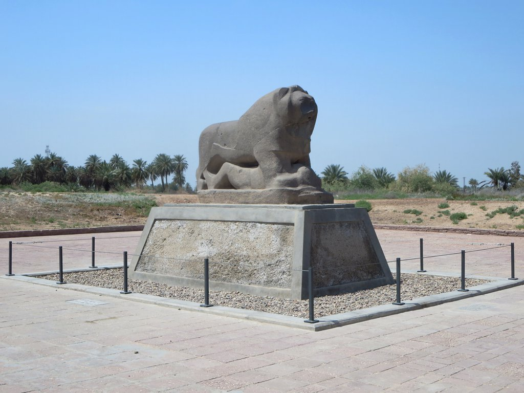 The basalt Lion of Babylon statue at Babylon, Iraq.